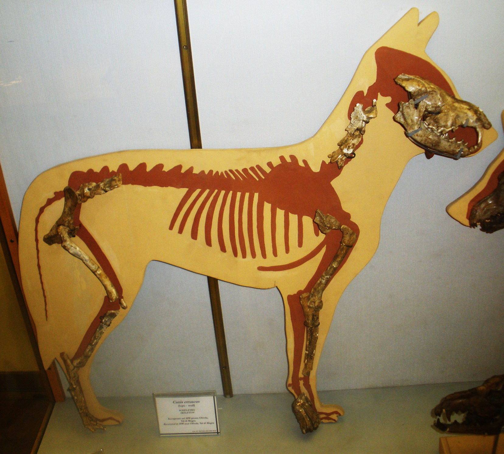 Fossil of Canis etruscus, an extinct mammal - Took the picture at Museo di Paleontologia di Firenze